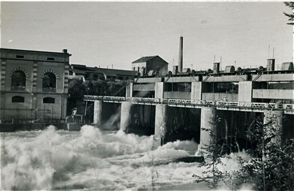 Barrage au fil de l'eau et bâtiment de l'usine hydroélectrique de Chèvres